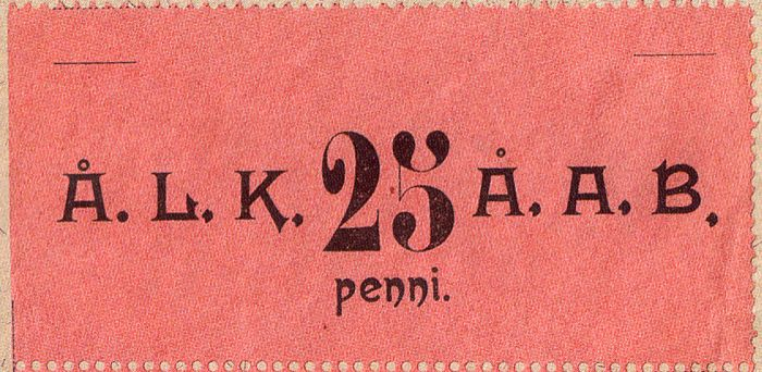 Почтовая марка частной почты пароходной компании Åbo Läns Kustångbåts, 1906